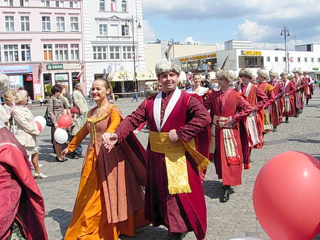 Ochody Święta 3 Maja na Starym Rynku w Bydgoszczy. Taniec zespołu "Ziemia Bydgoska".